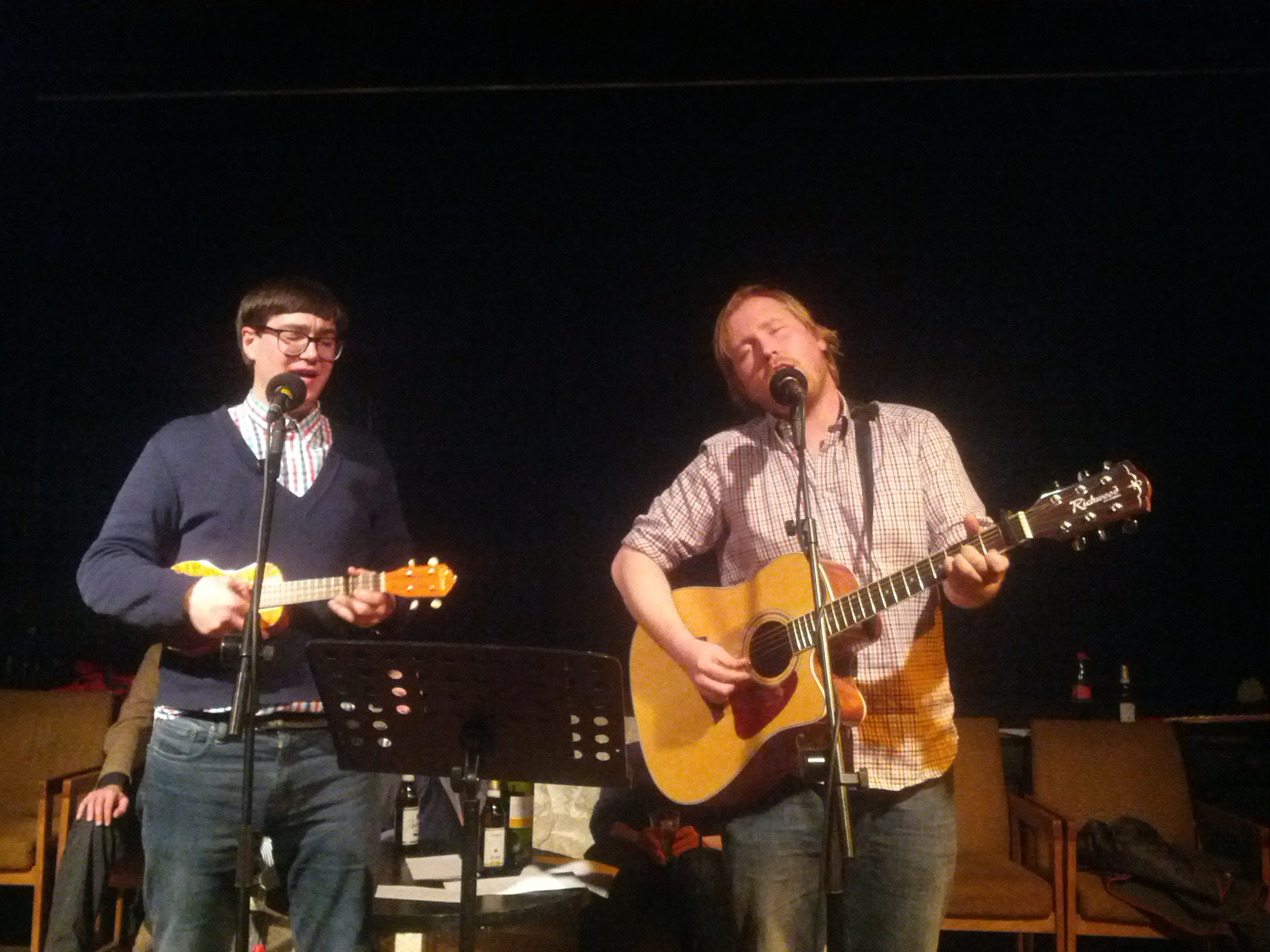 The Fuck Hornisschen Orchestra in der Scheune in Dresden